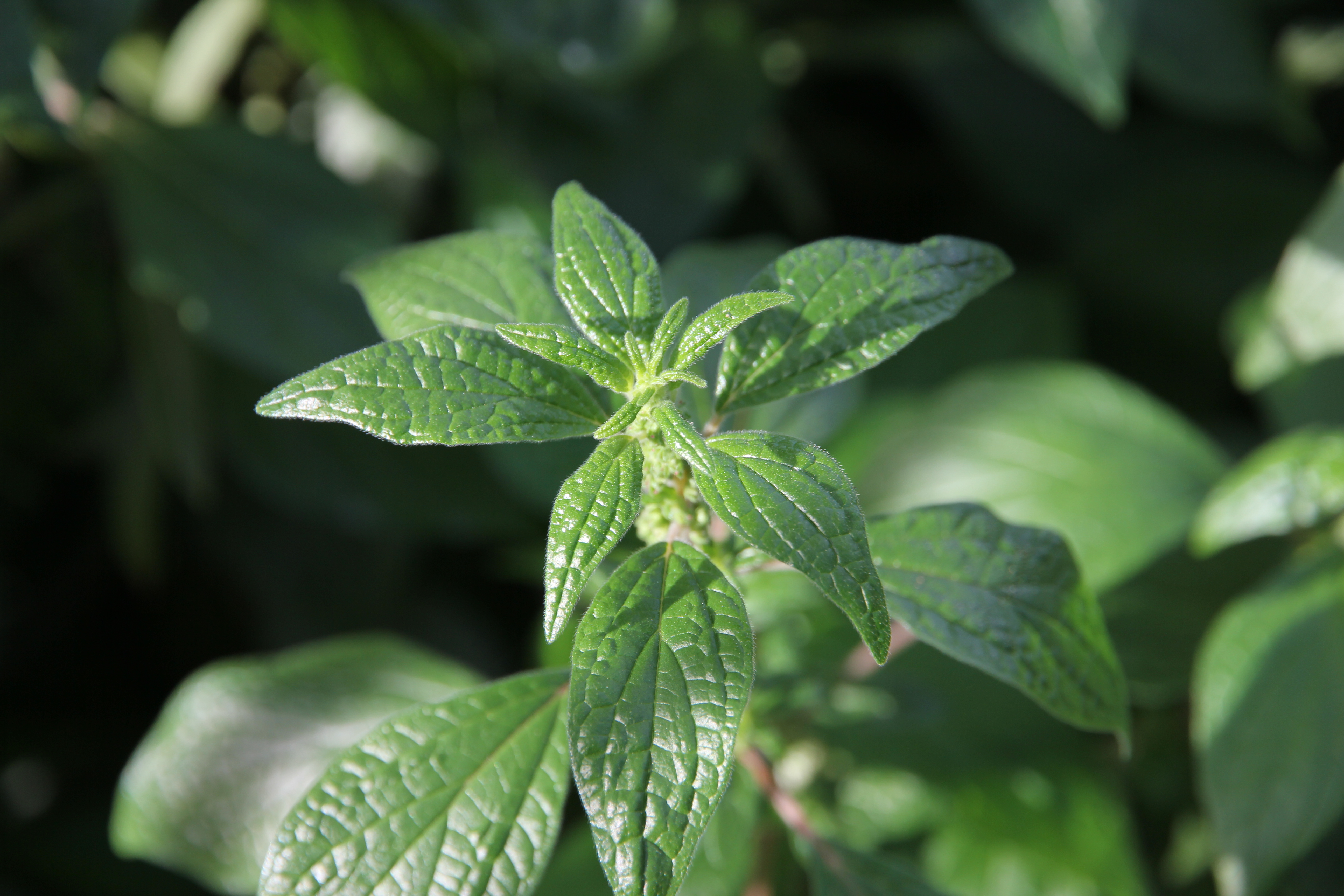 Flora della Sardegna